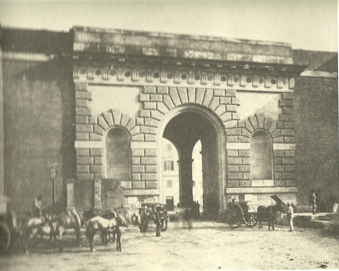 Porta Salaria come ricostruita da Virginio Vespignani.